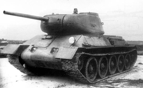 Tank T-43